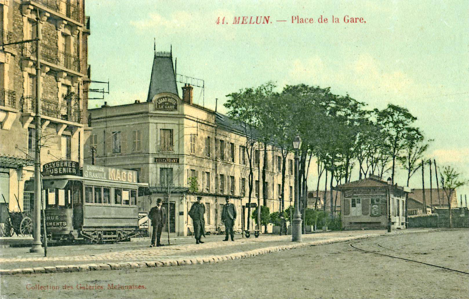 Carte postale éditée par les Galeries Melunaises, n°41 : MELUN : Place de la Gare